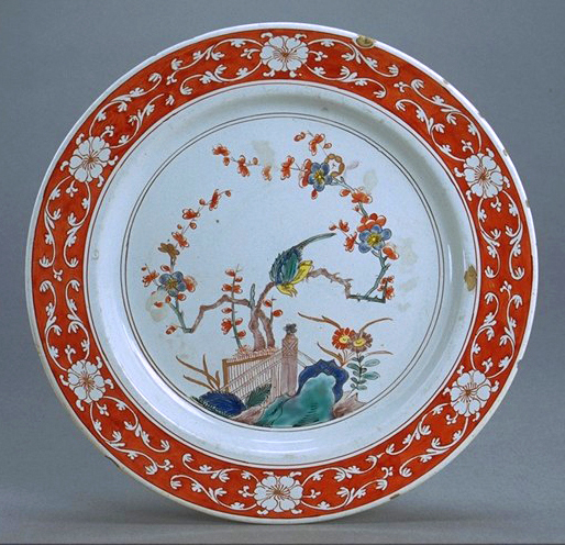 Piatto con decoro all'orientale. Fabbrica Clerici, Milano, XVIII secolo.